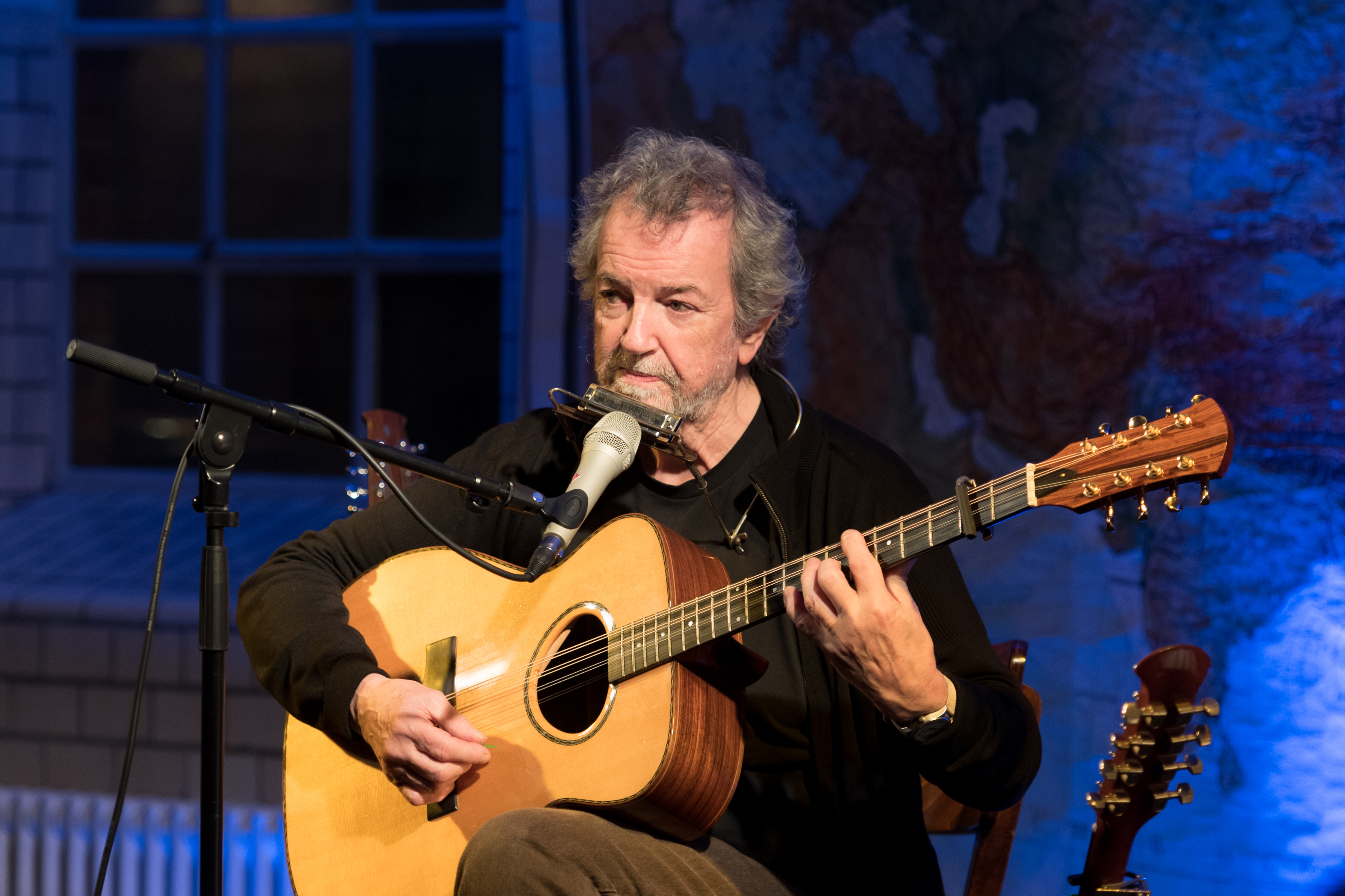 Andy Irvine bei Lottes Musiknacht im Industriemuseum Elmhorn 2016